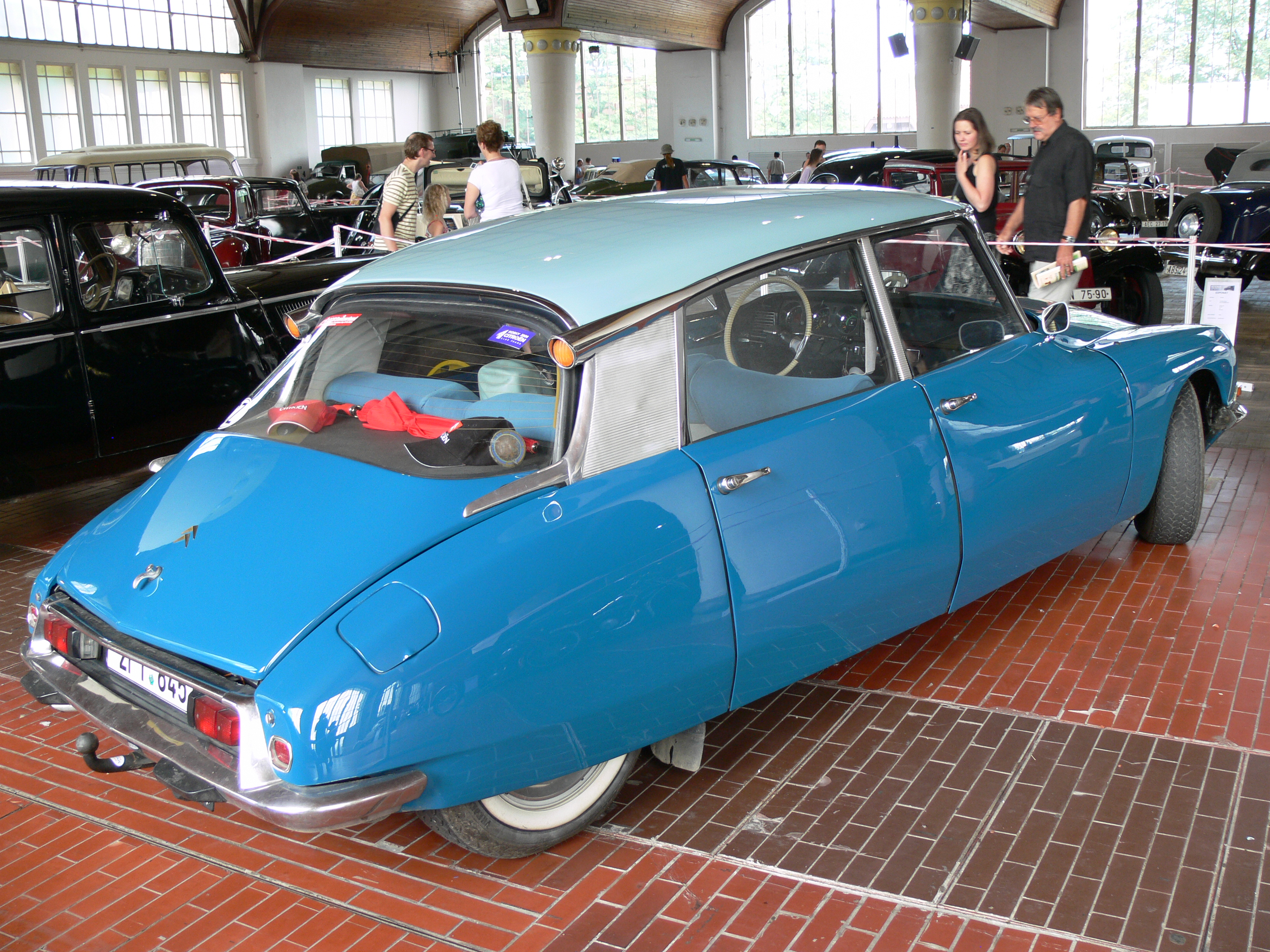 Citroen DS Veteran Motor Show